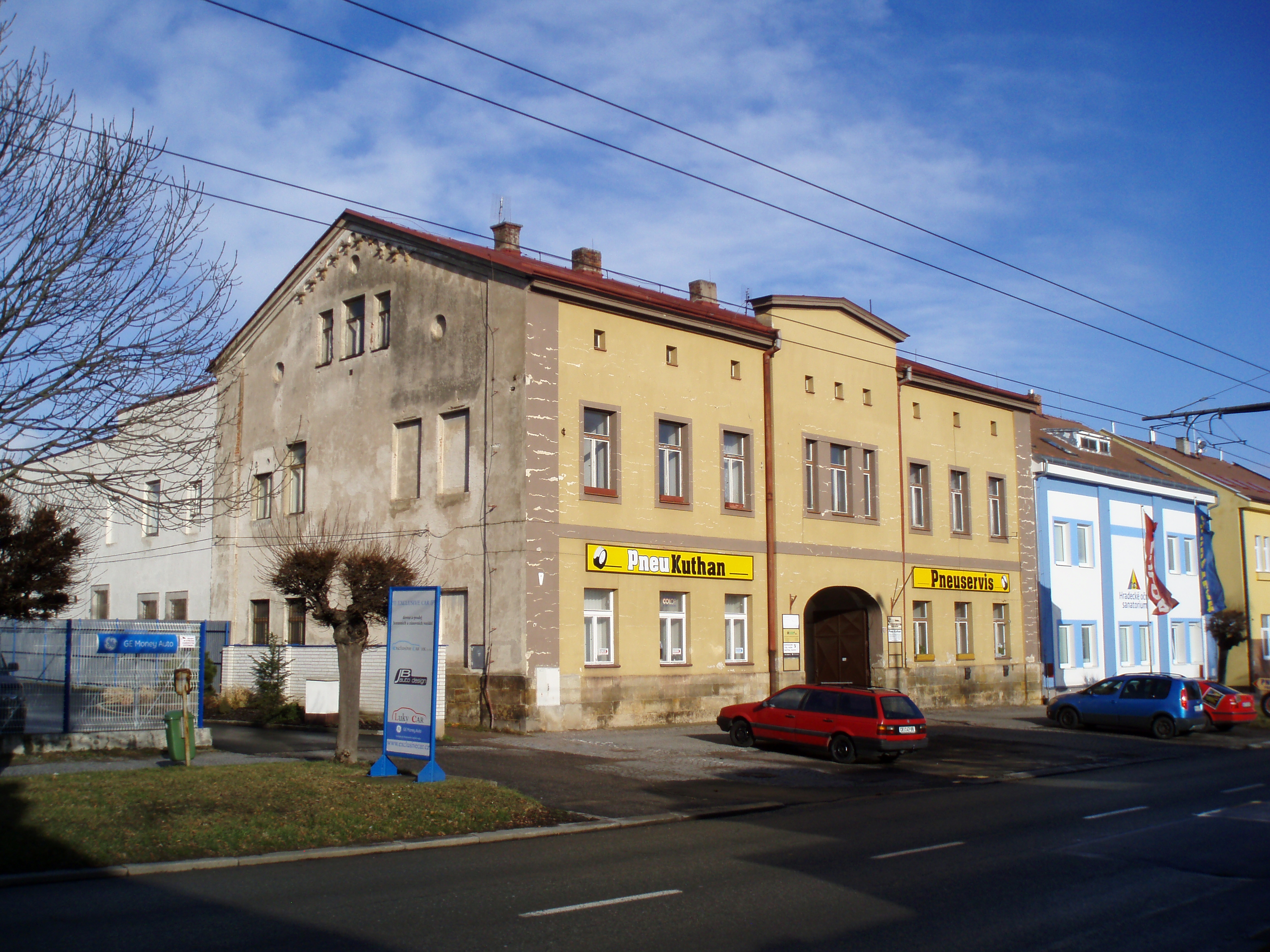 Pražská třída čp. 153